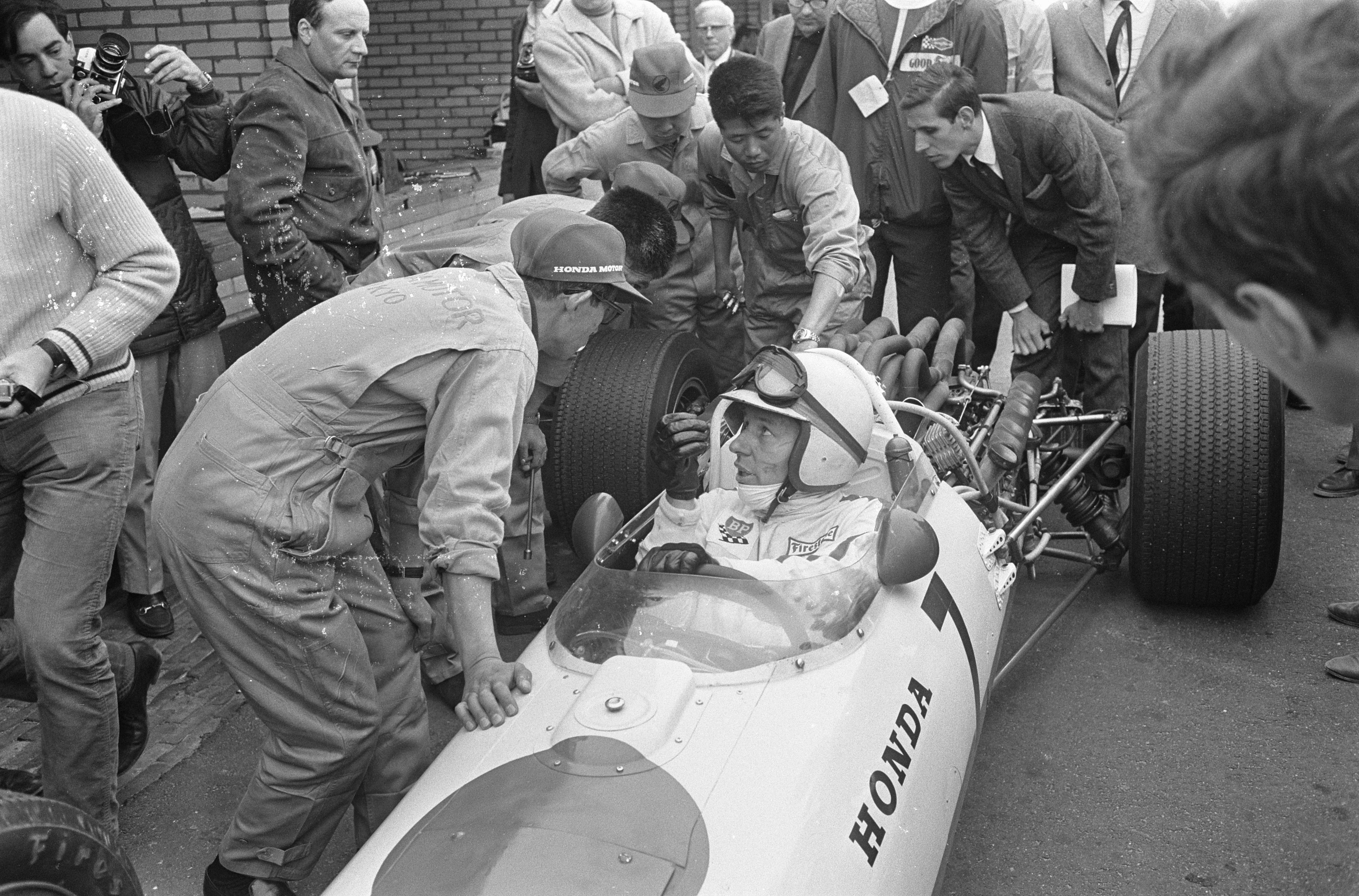 Grand Prix te Zandvoort.